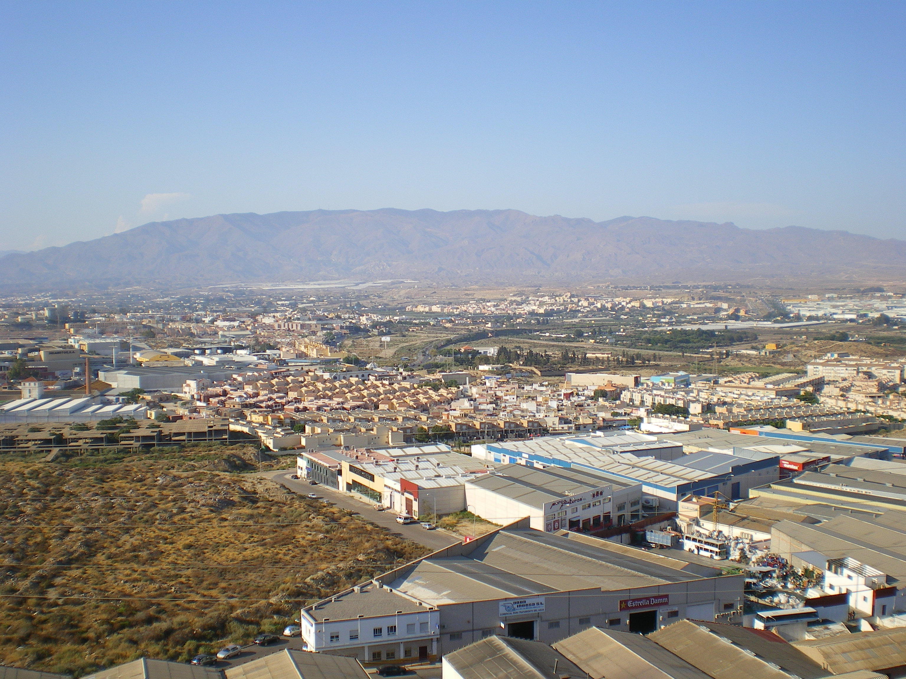 Fotografía de la falda sur de Sierra Alhamilla, provincia de Almería, España, tomada desde Torre de Cárdenas, mirando al norte. Altura máxima 1.387 msnm, pico del Colativí. En primer plano polígonos industriales de Huércal de Almería.